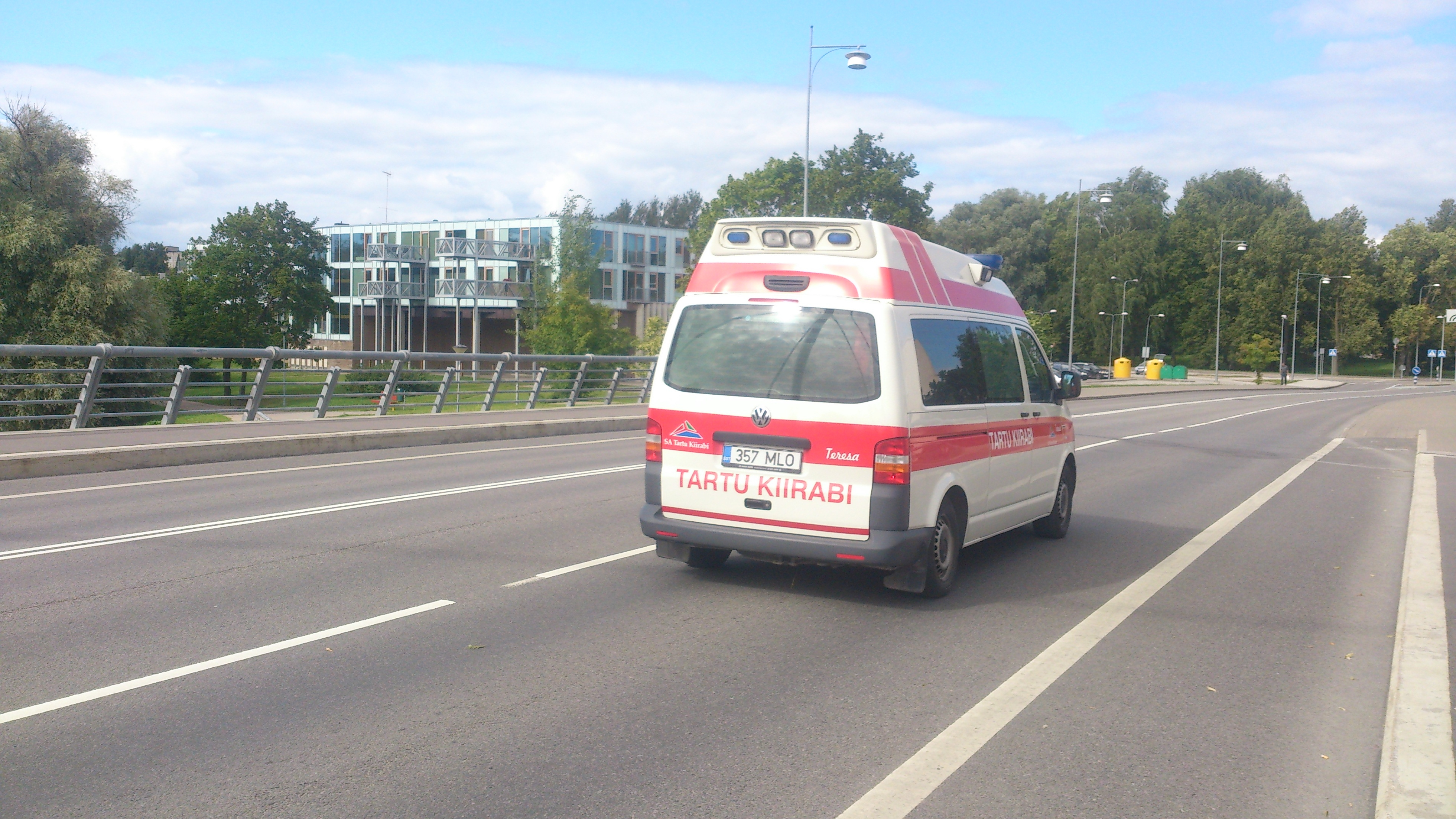 Tartu kiirabi Tartus Vabadussillal, 1. august 2015